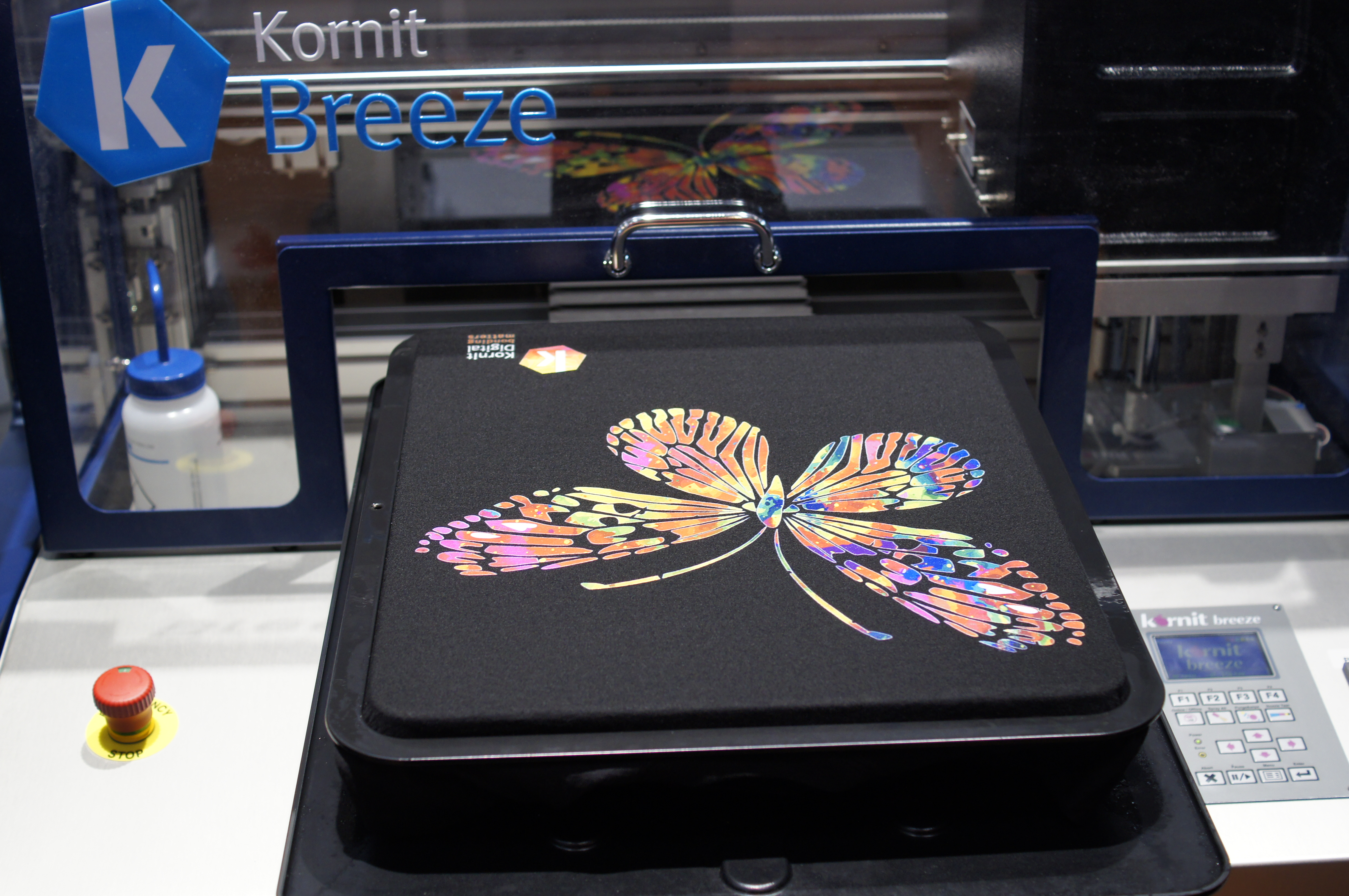 T-shirt inkjet decorated with water-based bio-degradable opaque white and colour inks